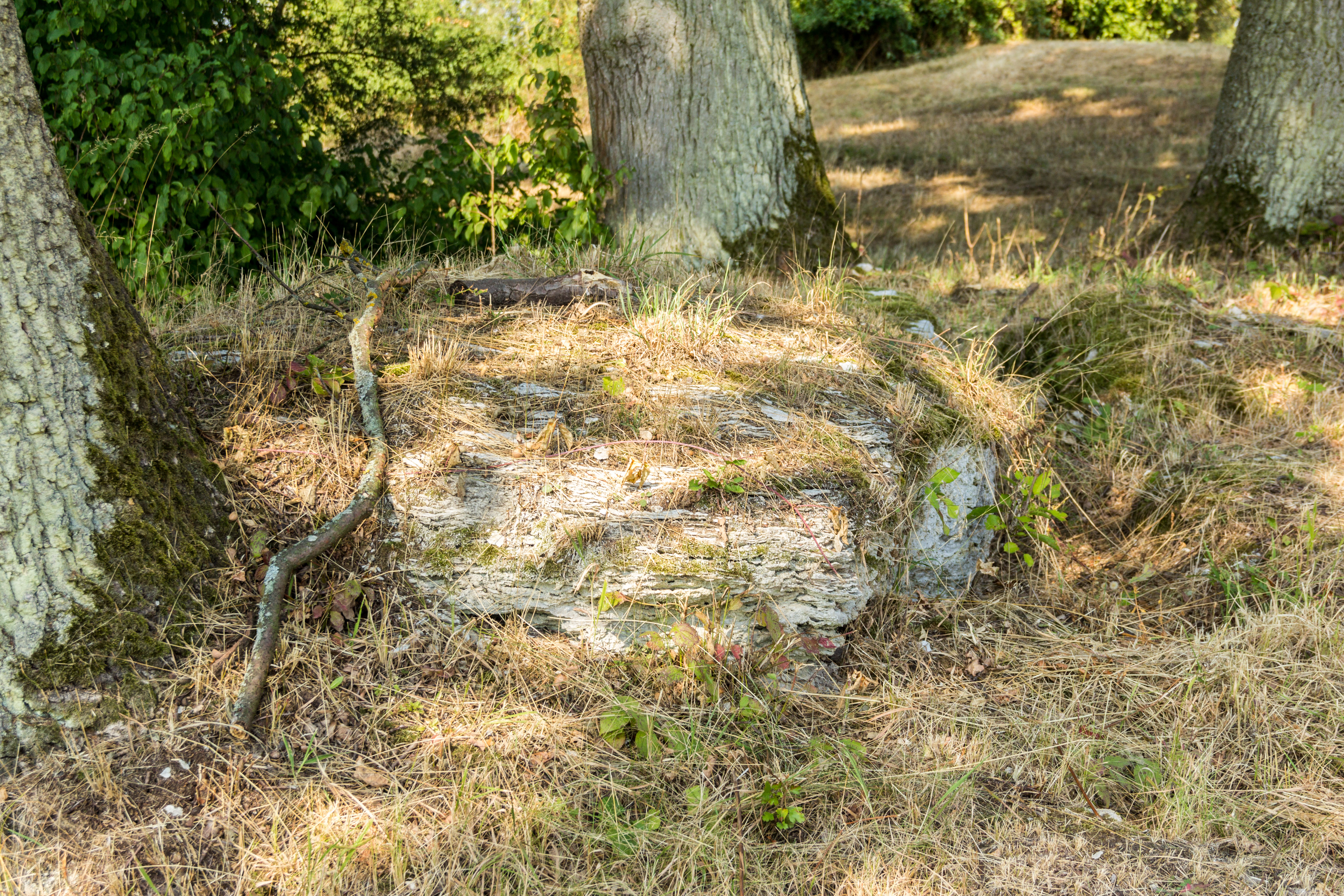 Sulzheimer Gipshügel, Naturschutzgebiet, Geotop, Sulzheim in Unterfranken